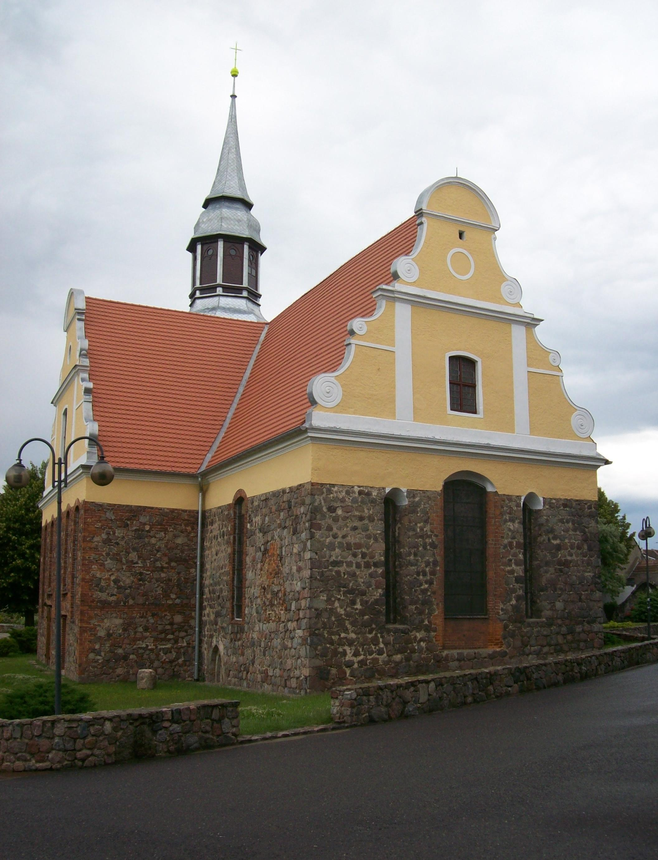 XIII-wieczny kościół pw. NNMP w Pełczycach.